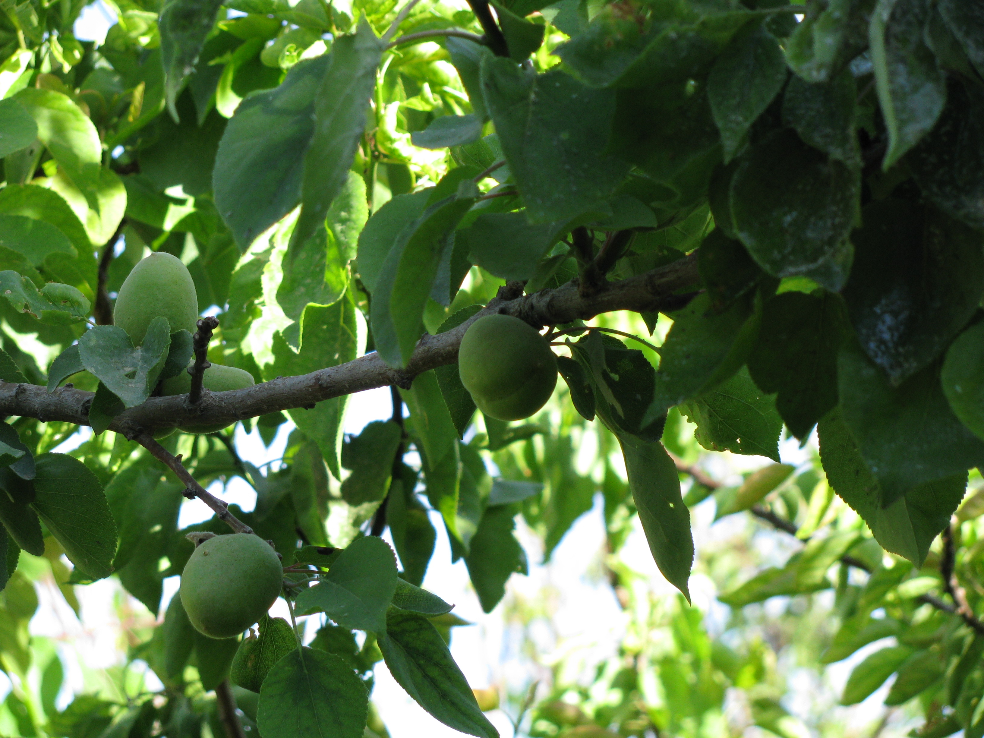 باغ میوه در کوجوار